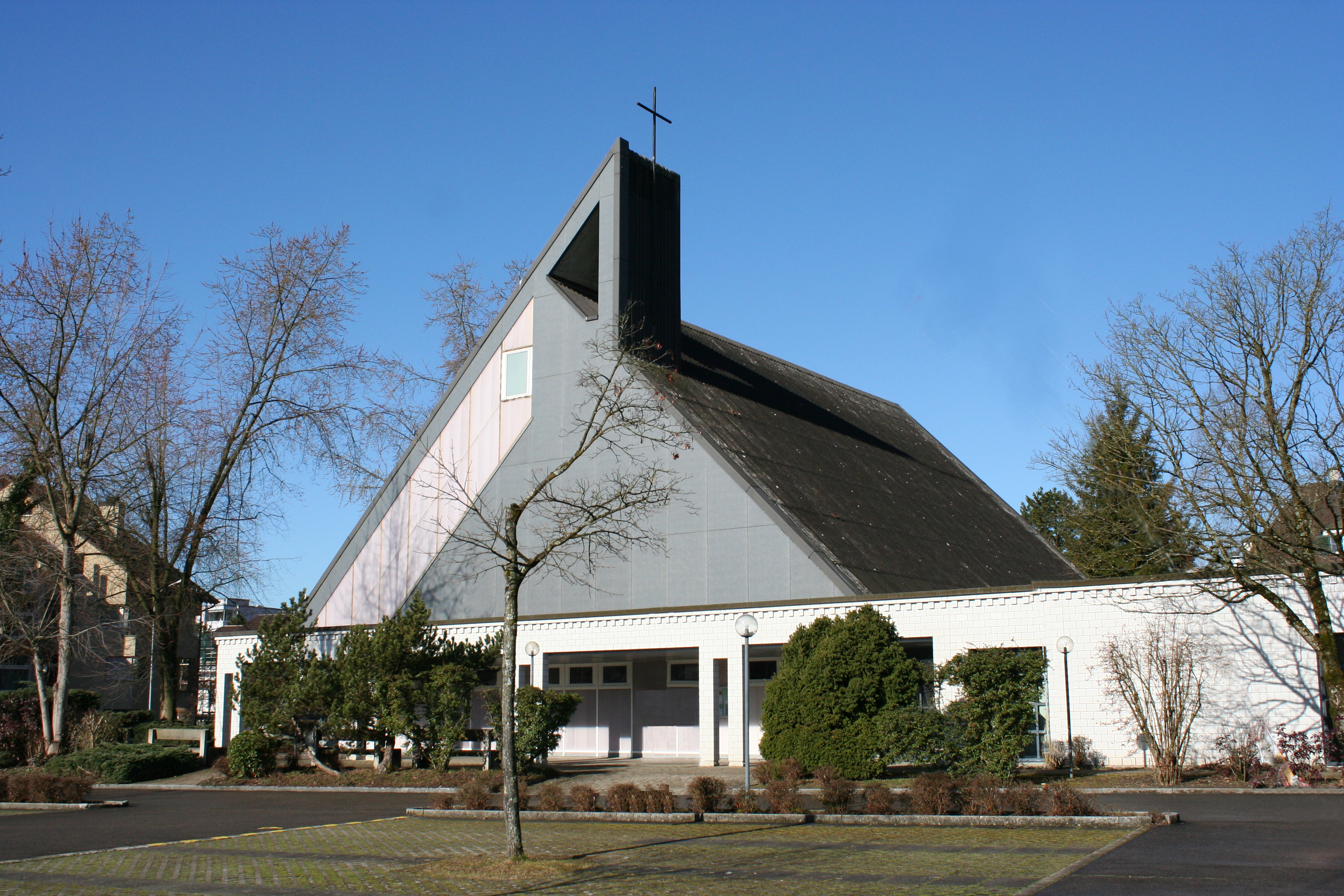 Römisch-katholische Pfarrkirche St. Franziskus Bassersdorf, Ansicht von Osten